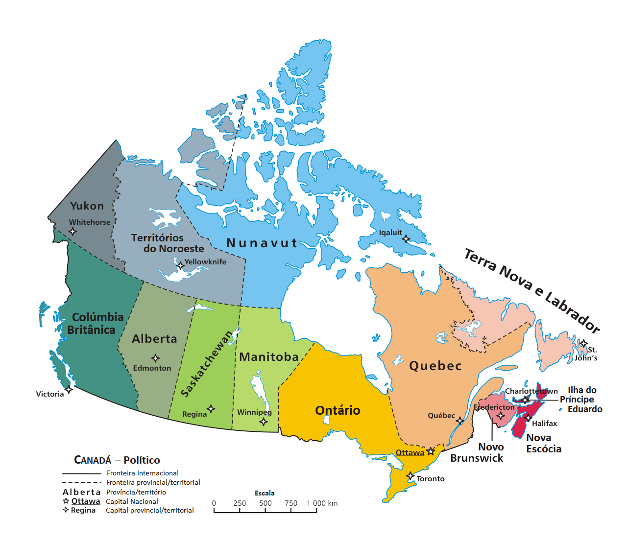 A map of Canada exhibiting its ten provinces and three territories, and their capitals in Bosnian. (Lambert conformal conic projection from The Atlas of Canada)